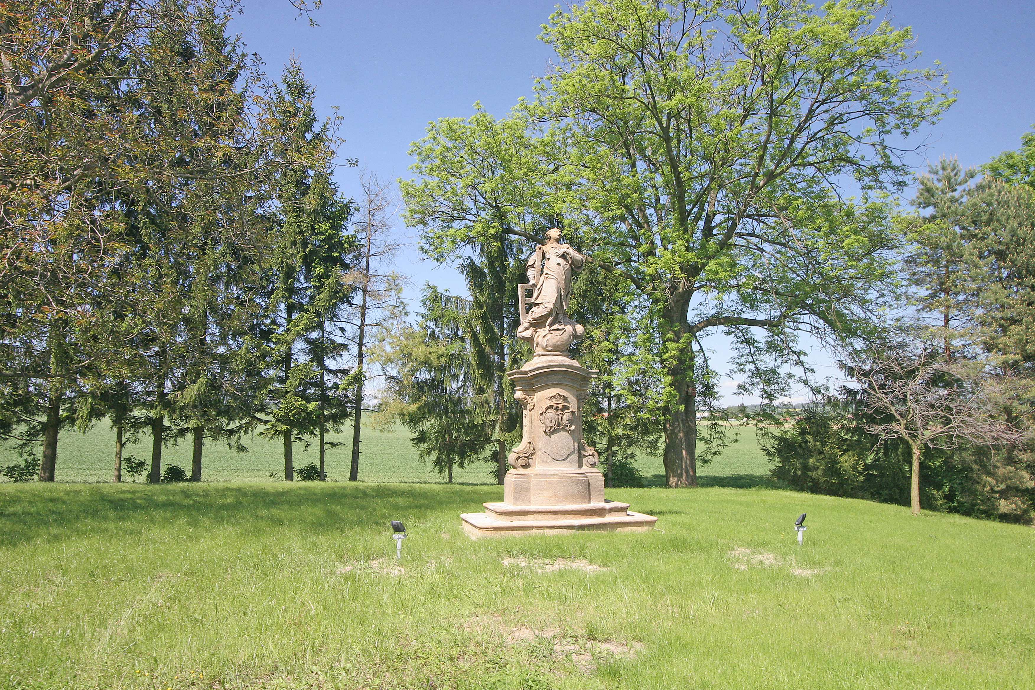 Socha sv. Vavřince (Vinice), u odbočky na Ostrov, Vinice